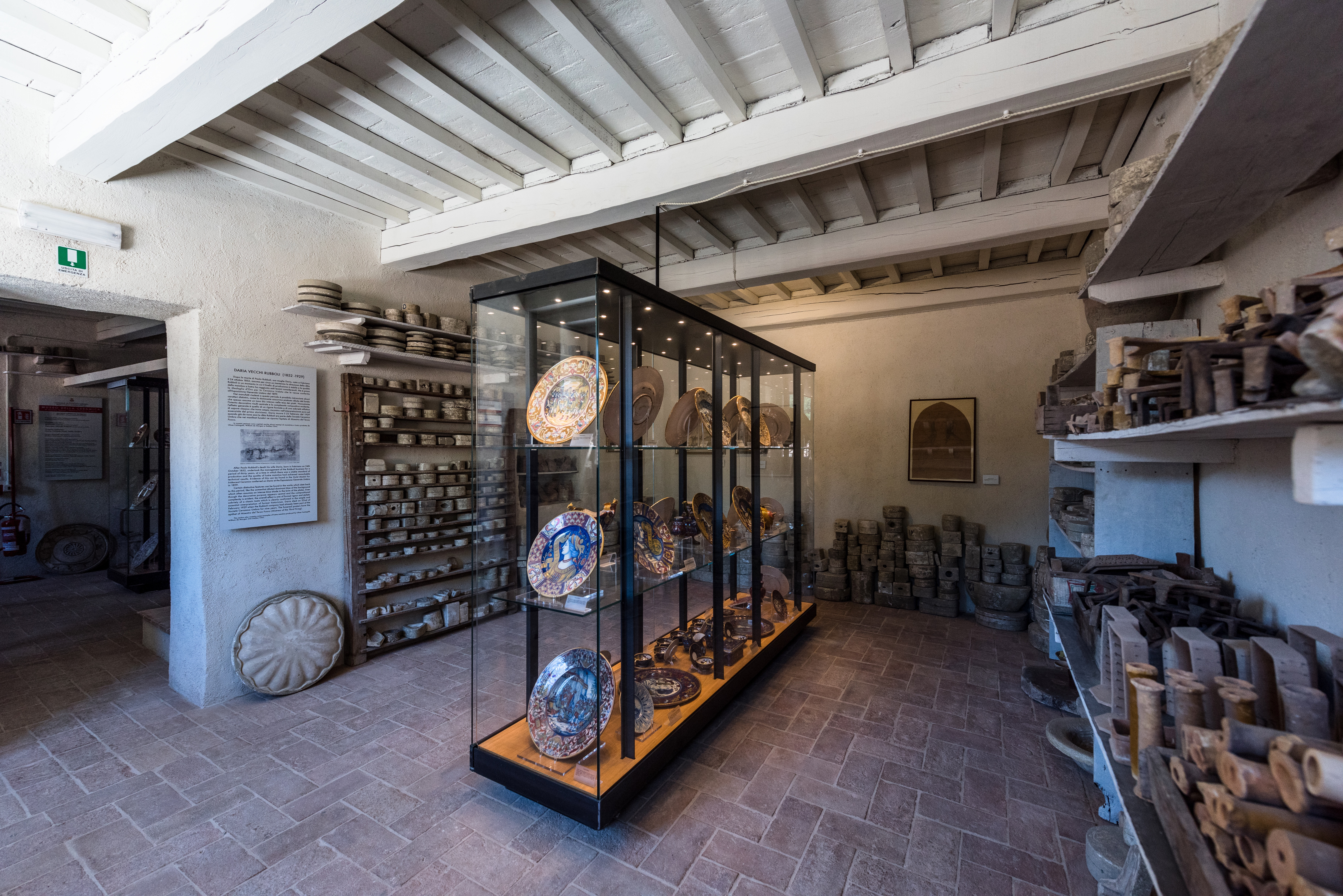 Sala della Formatura del Museo Opificio Rubboli dedicata alla figura di Daria Rubboli, sono presenti opere risalenti al periodo dal 1890 al 1920